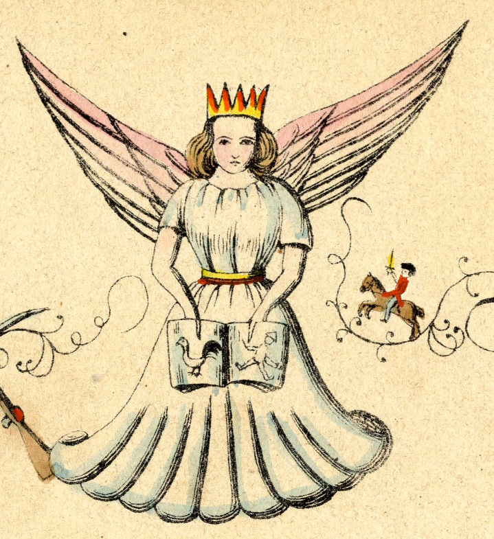 Christkind. Ausschnitt aus Heinrich Hoffmanns Lustige Geschichten und drollige Bilder für Kinder von 3 bis 6 Jahren